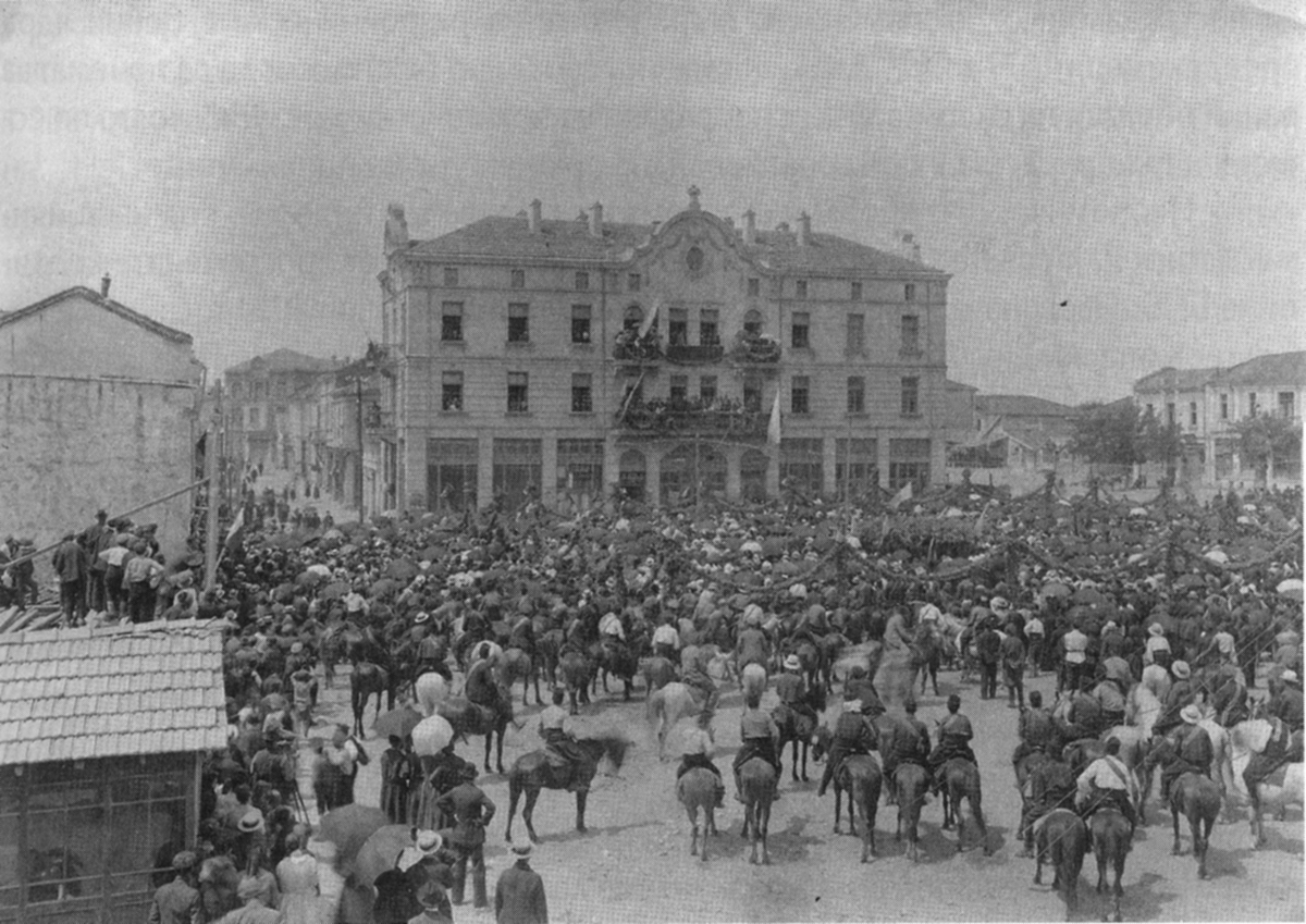 Митинг на Оранжевата гвардия в Хасково